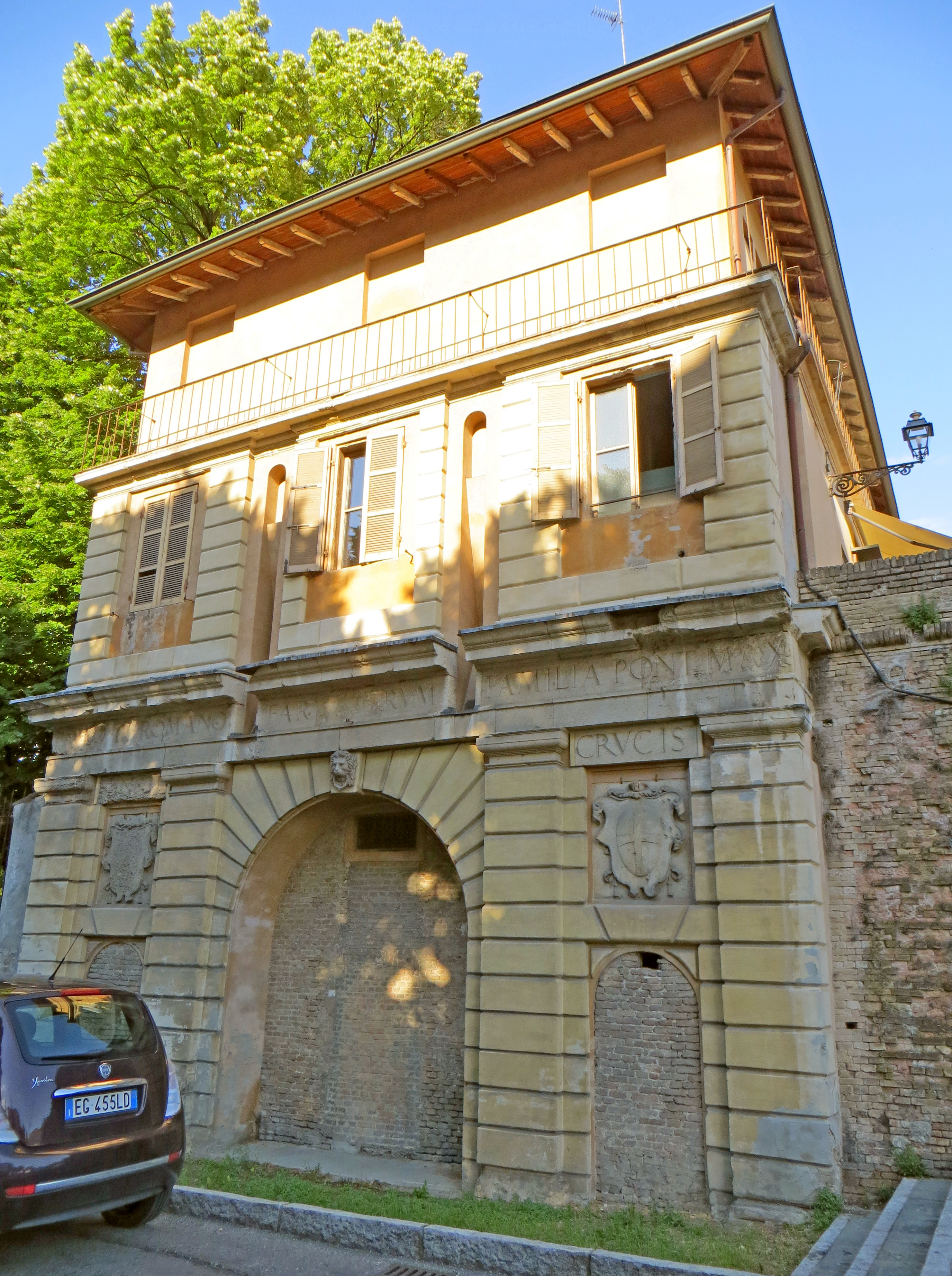 Porta Santa Croce (Parma) - prospetto esterno